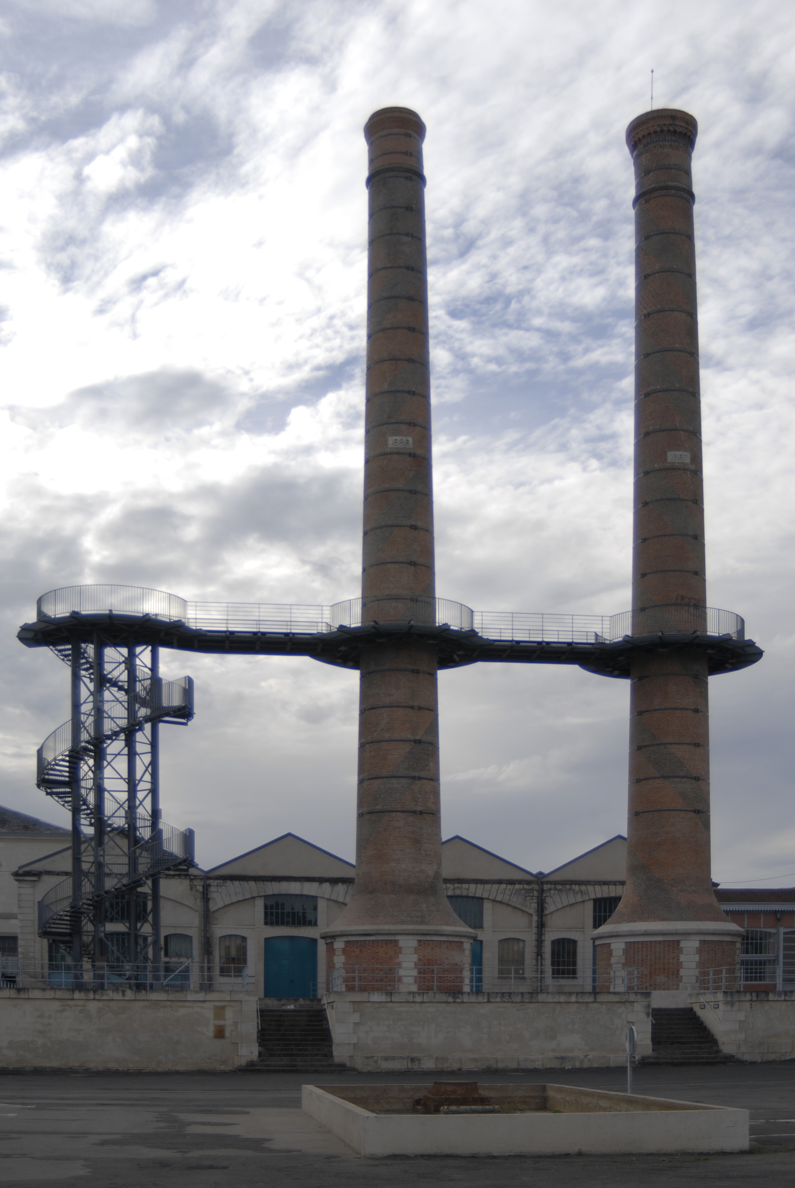 Les deux cheminées de l'ancienne alimentation en énergie de la manufacture, avec la passerelle pour visiteurs.